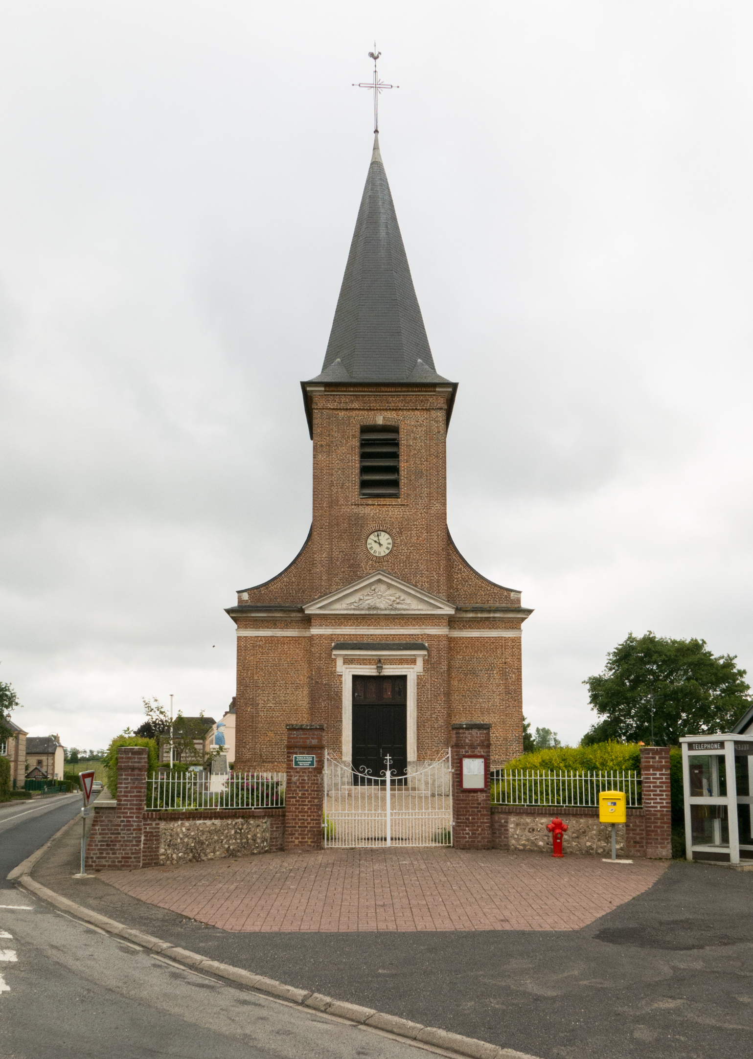 Vergetot Churchyard